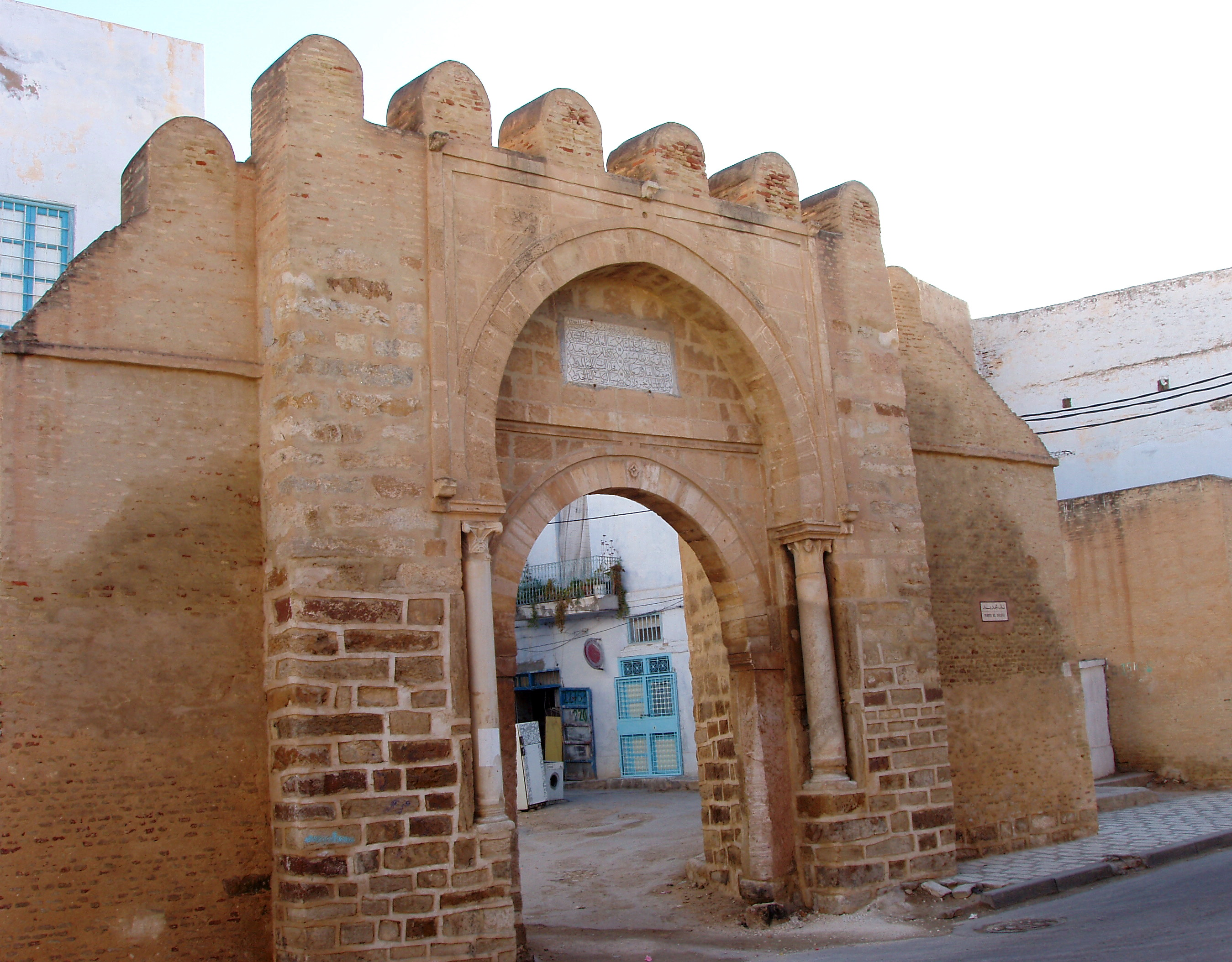 Bab Djedid gate in Kairouan